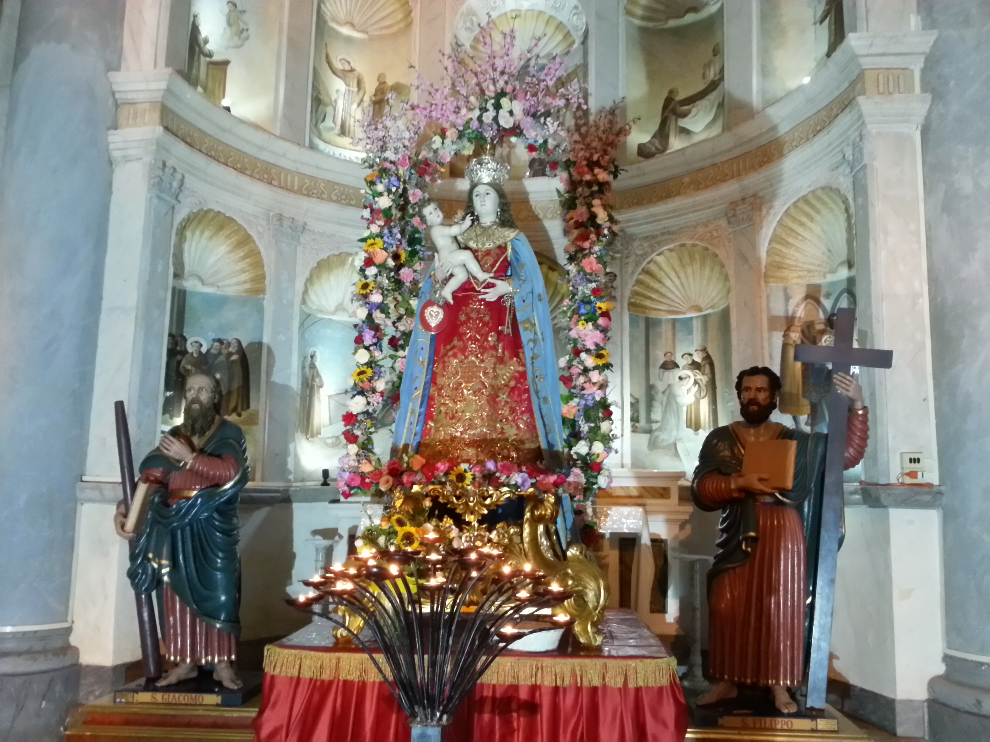 Statua della Madonna di Belvedere e dei Santi Giacomo e Filippo, in esposizione durante i festeggiamenti della Madonna dell'Uragano